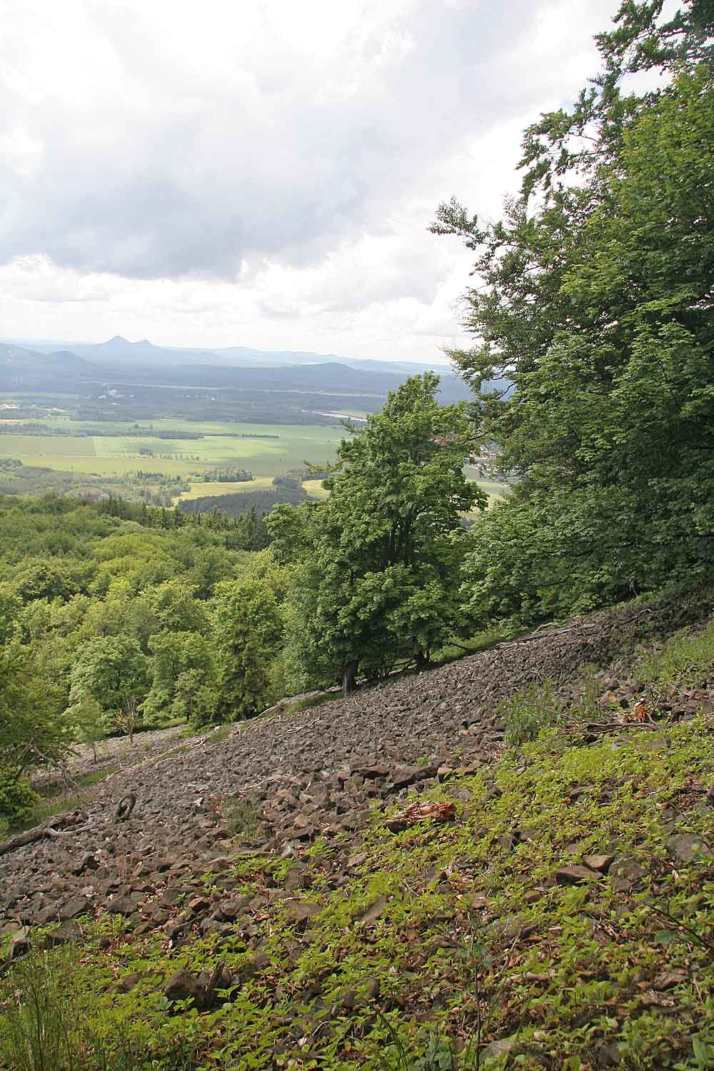 PP Ralsko - sutě na úbočí